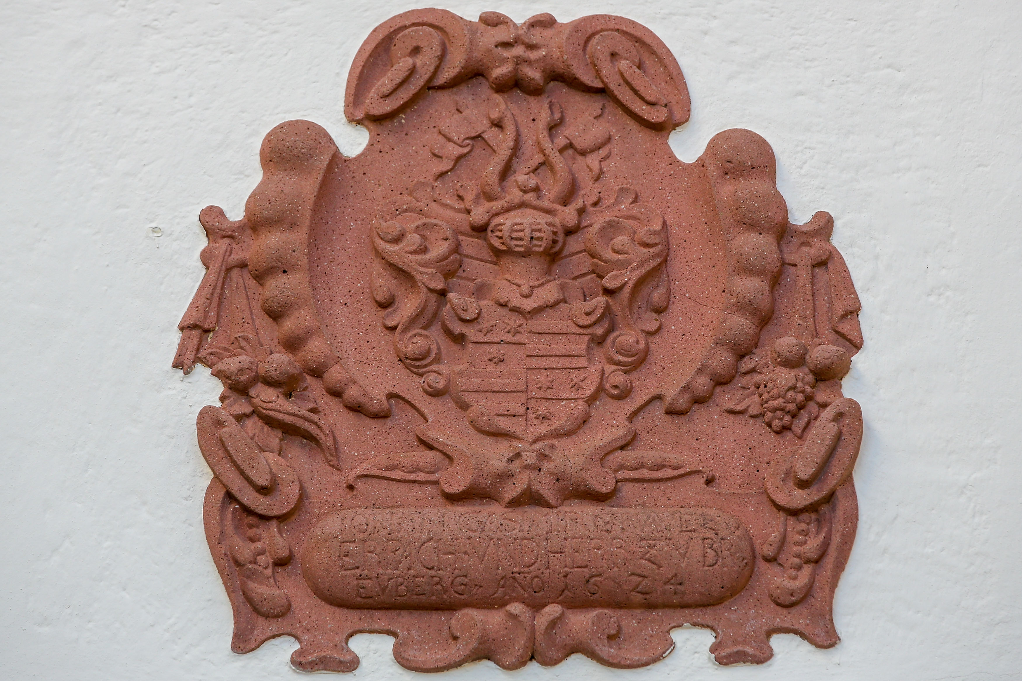 Wappen über Durfahrt Neues Schloss